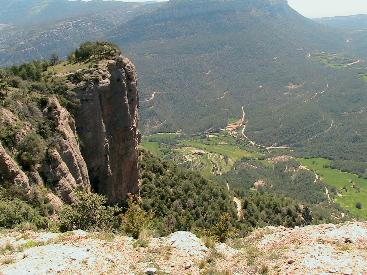 El Turó de l'Escala, a llevant del Cingle de la Creu de Busa. Navès (Solsonès - Catalunya)